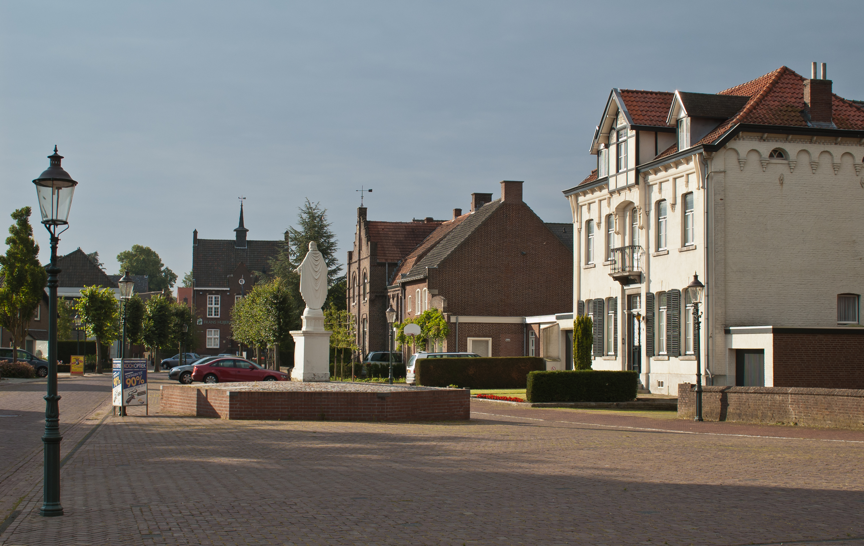 Der Kerkplein (Kirchplatz) in St. Odilienberg, Niederlande